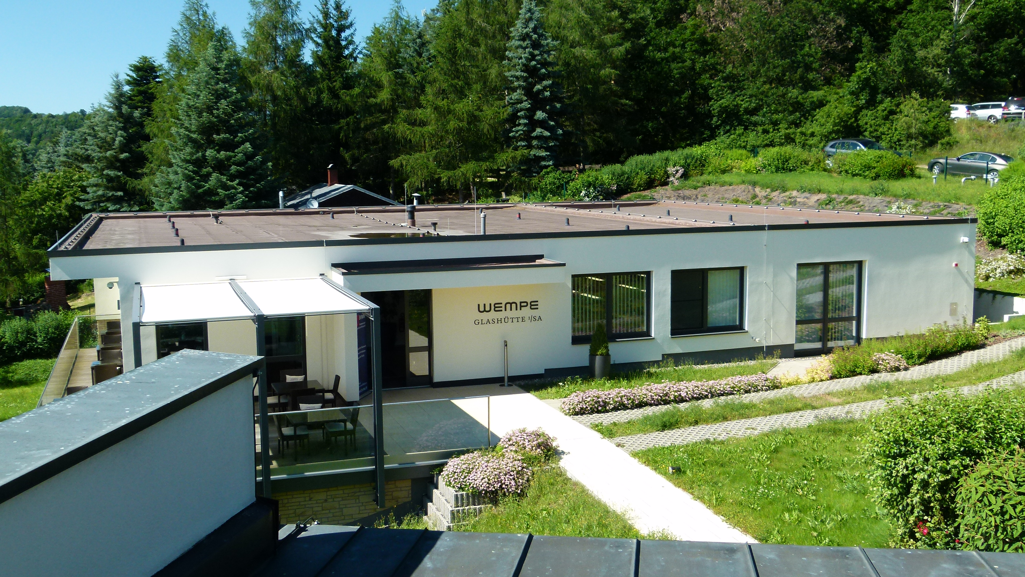 Uhrenhersteller Wempe, Produktionsstandort Glashütte; Sachsen